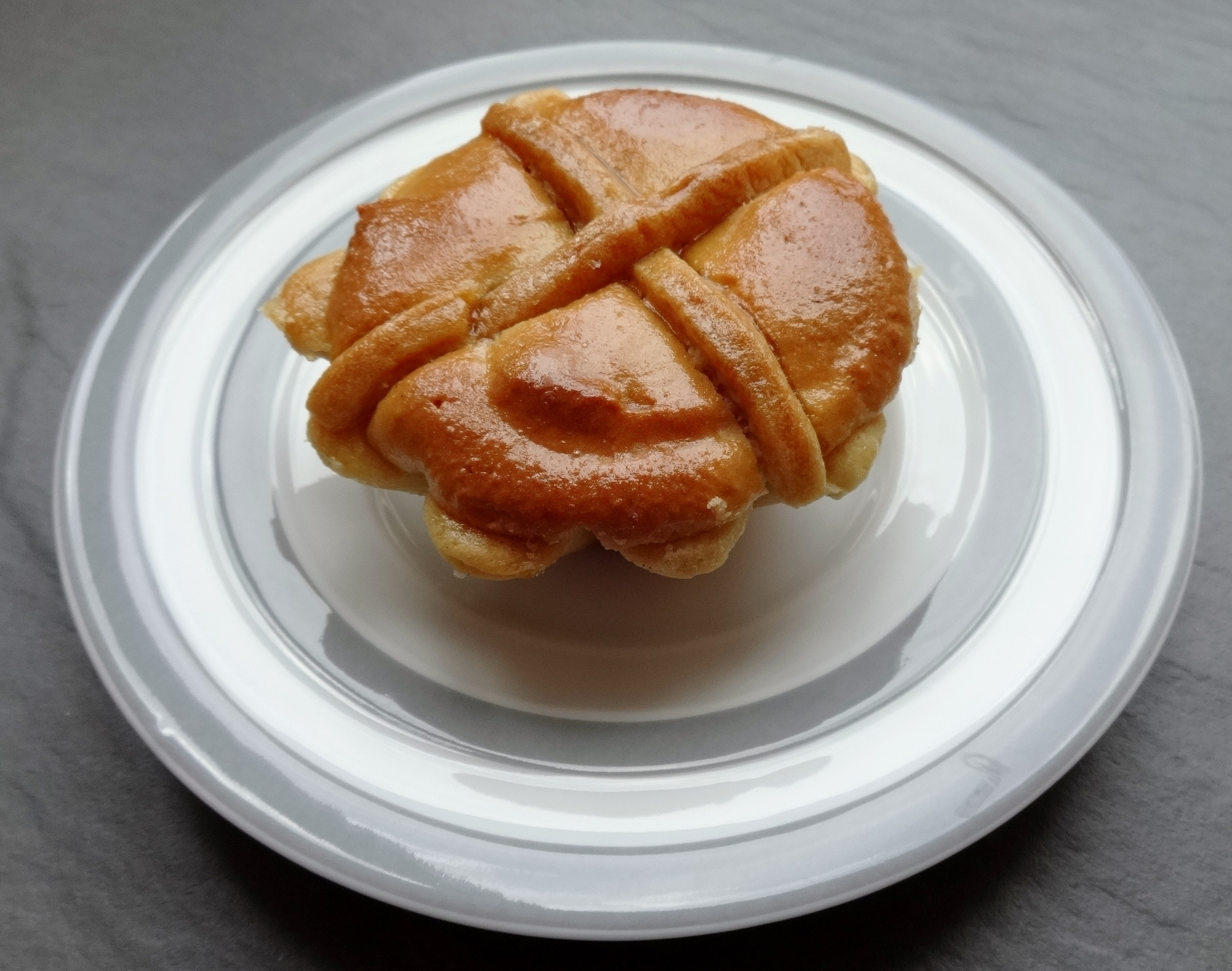 Traditionelle Gebäckspezialität aus Leipzig, die Leipziger Lerche, ein Mürbeteig mit Marzipan gefüllt – Handwerksbäckerei Kleinert im Brühl in Leipzig